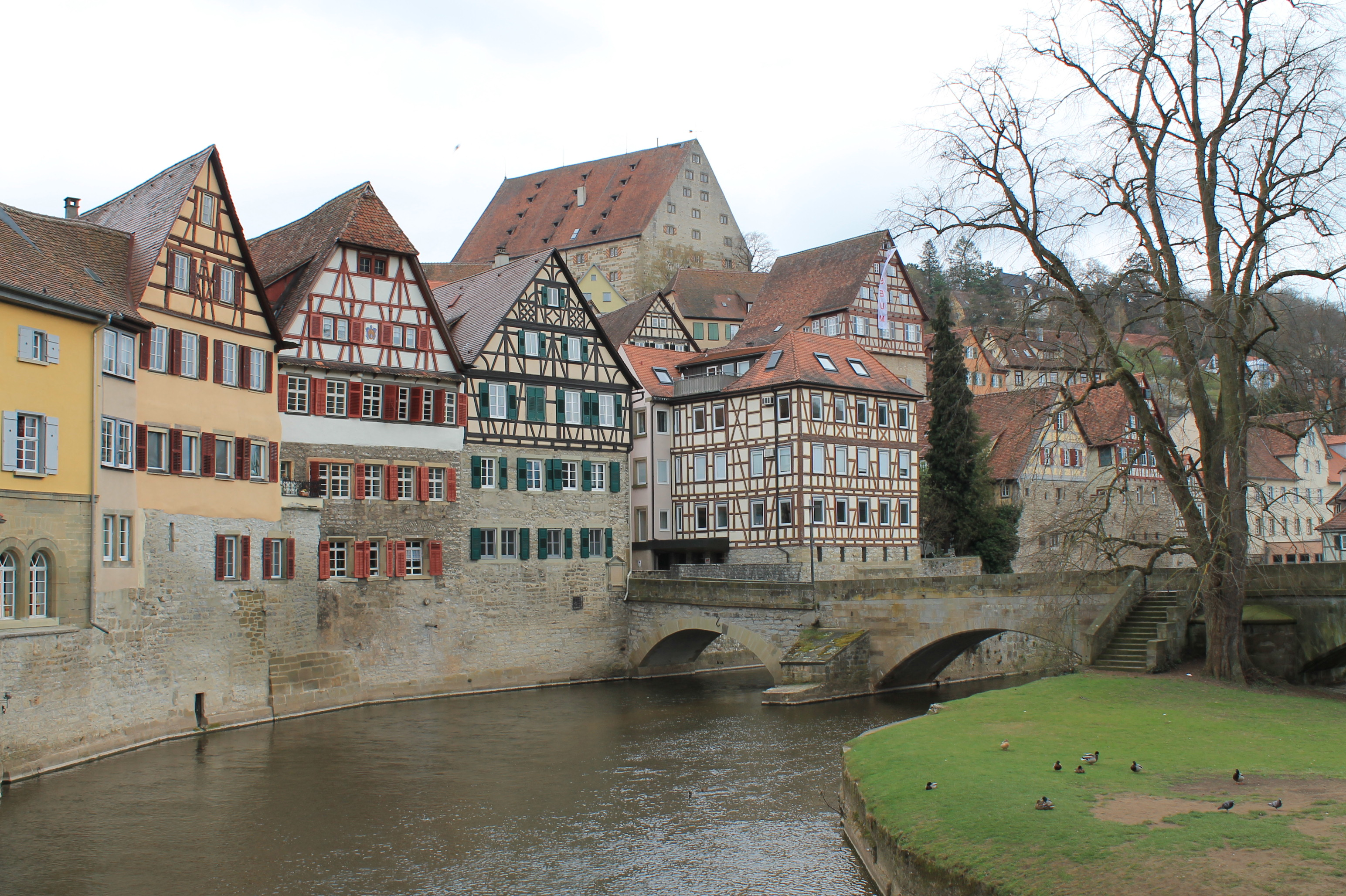 Schwäbisch Hall, vue vers l'est de la passerelle Sulfersteg qui connecte le Haalplatz et le Grasbödele, îlot sur la rivière Kocher. On voit la branche droite de la rivière, les murs de la cité, le pont Steinerner Steg et à l'horizon, l'arsenal Neubau.